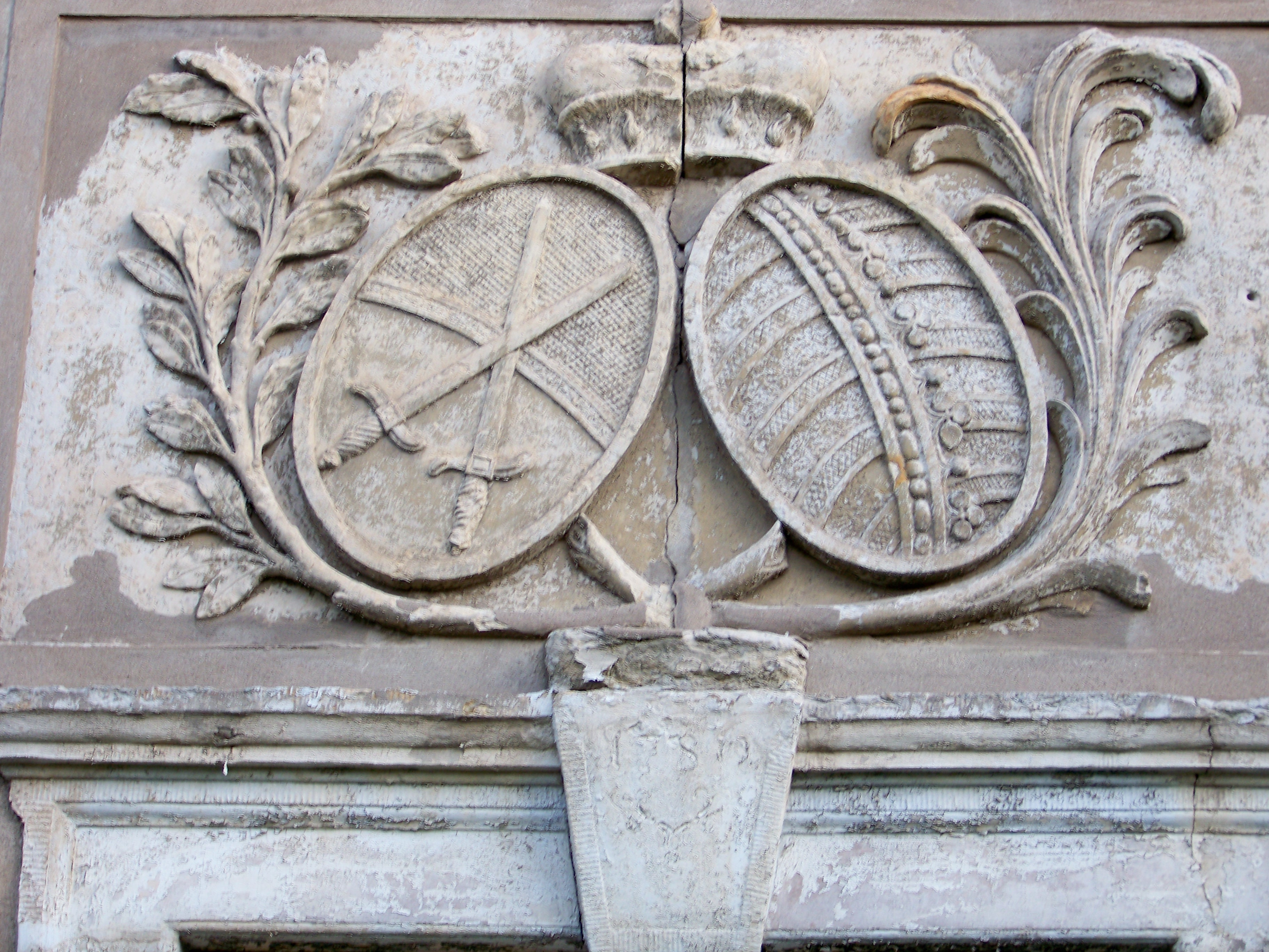 Kurfürstlich-sächsisches Doppelwappen über der Pforte des Amtshauses auf der Burg Eilenburg, darunter die Jahreszahl 1786